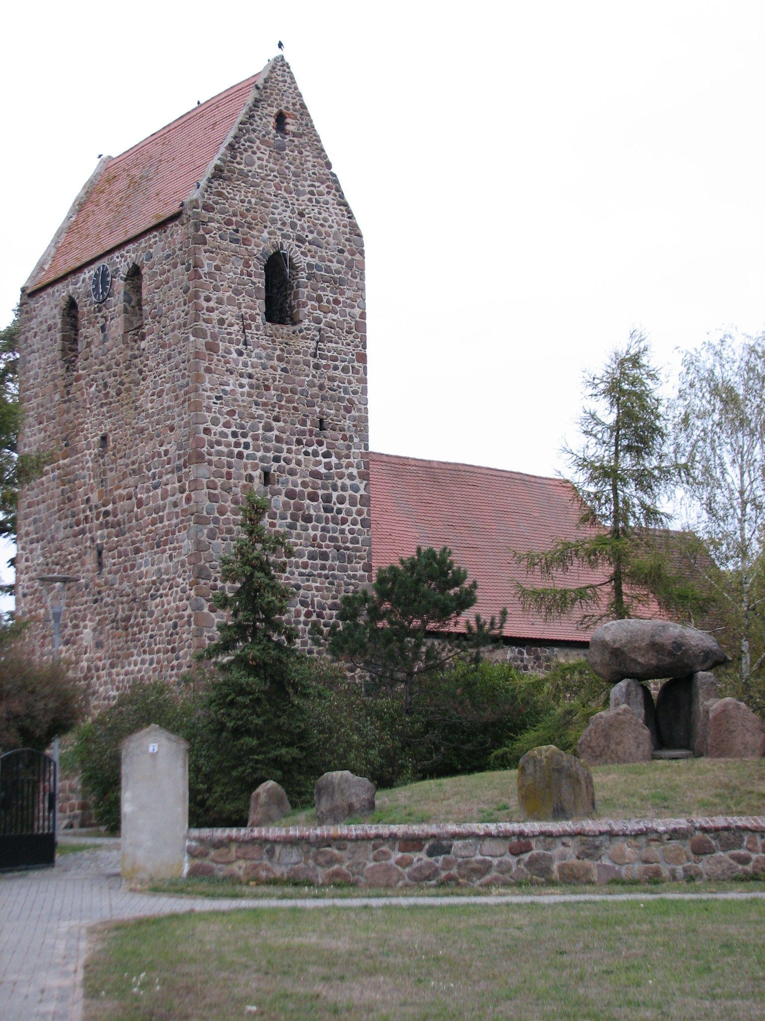 Kirche zu Kläden (Oktober 2018)